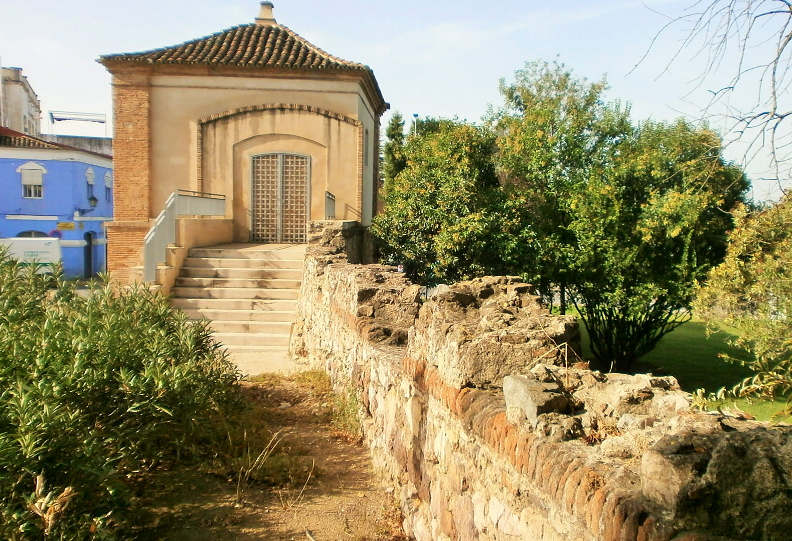 Vista suroriental y arranque de murallas.